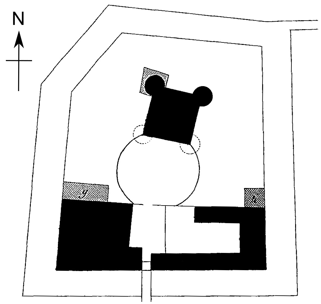 Lageplan des Schlosses Tumßejus im Jahr 1810